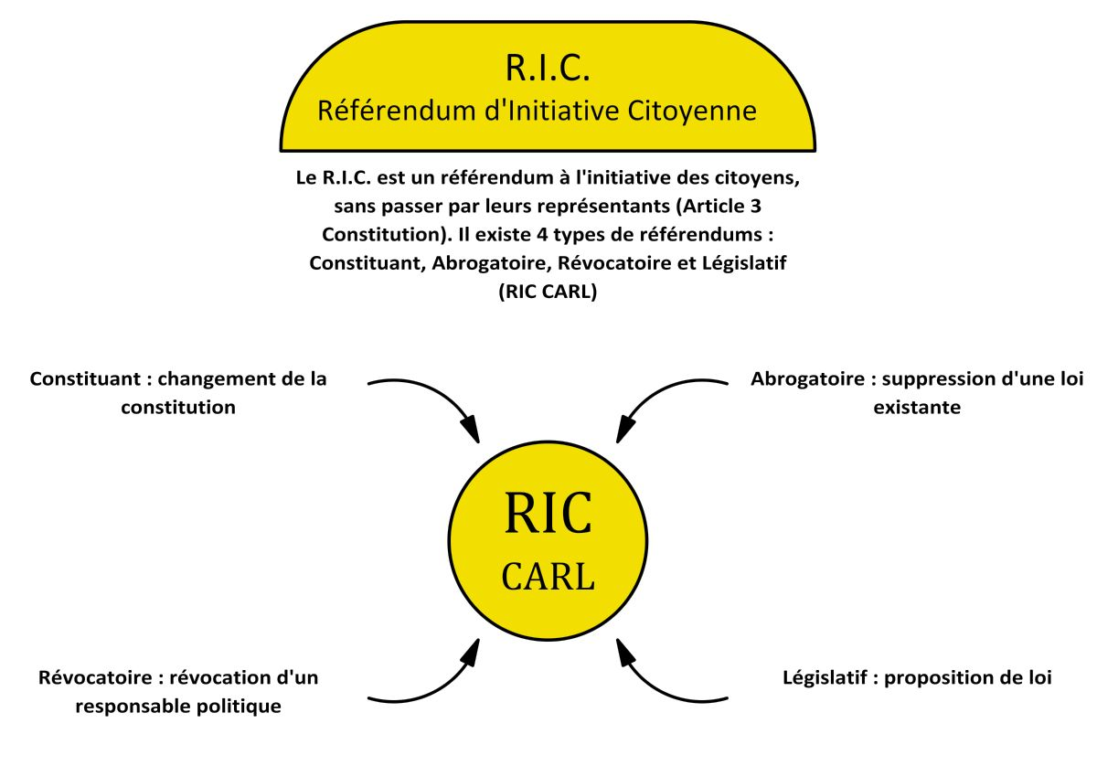 Référundum d'initiative citoyenne, Gilets jaunes